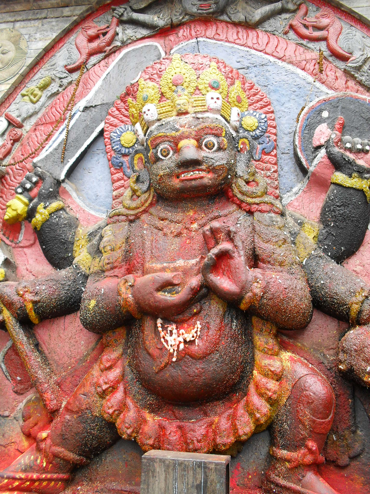 Basantapur Kathmandu Nepal